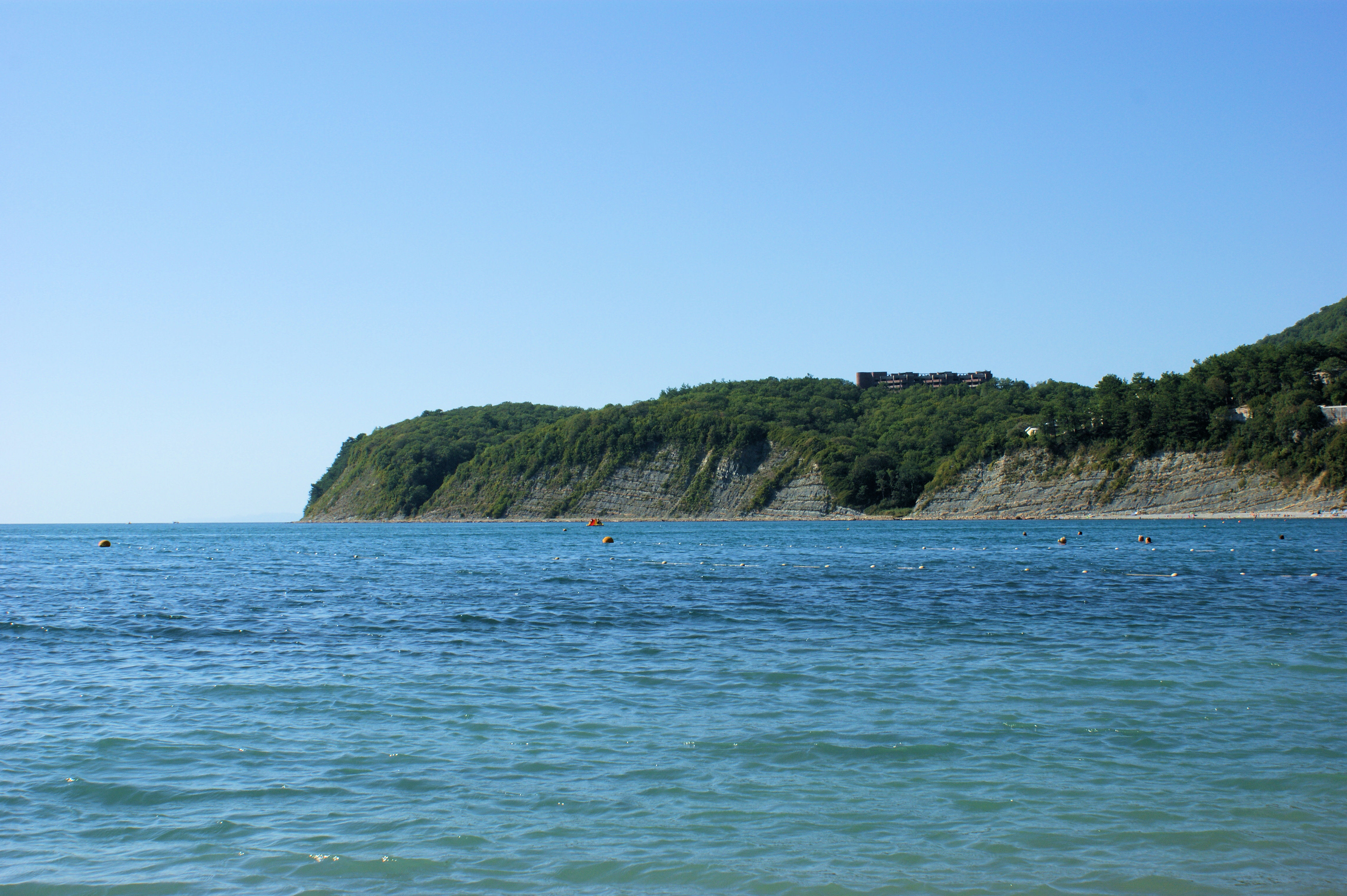 Мыс Агрия